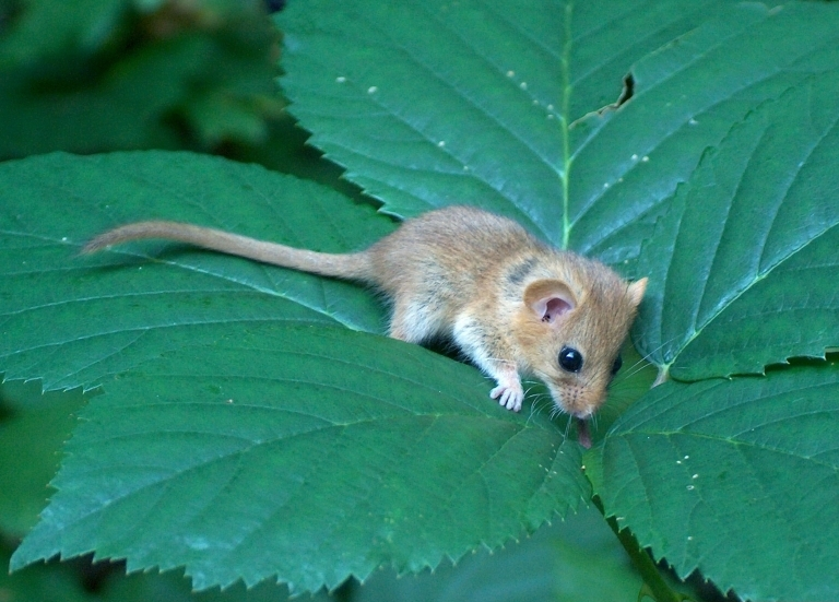 Muscardinus avellanarius (Linnaeus, 1758)